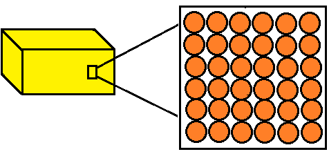 पदार्थ का ठोस अवस्था